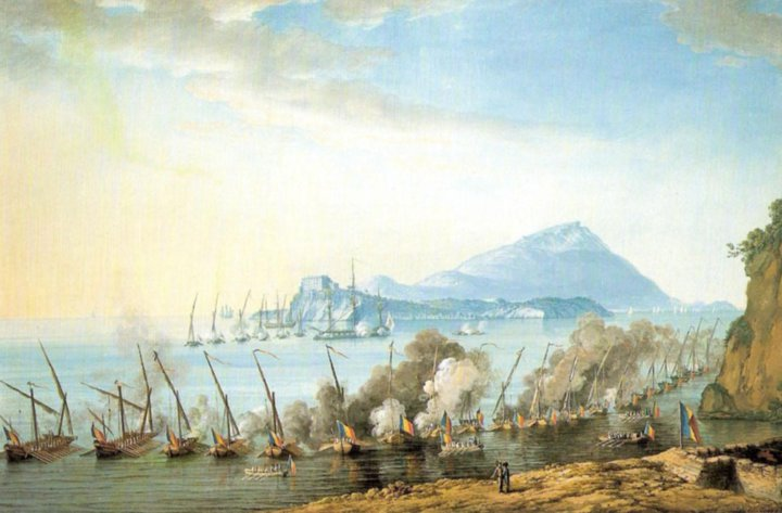 Il quadro è di Saverio (Xavier) della Gatta (attivo nel Napoletano dal 1777 al 1827) e si chiama "Battaglia tra le navi della Repubblica Partenopea e inglesi a largo di Procida": un episodio eroico in cui si distinse il giovane ammiraglio Francesco Caracciolo comandante della marina repubblicana, a scapito delle forze inglesi e borboniche che volevano occupare Procida.